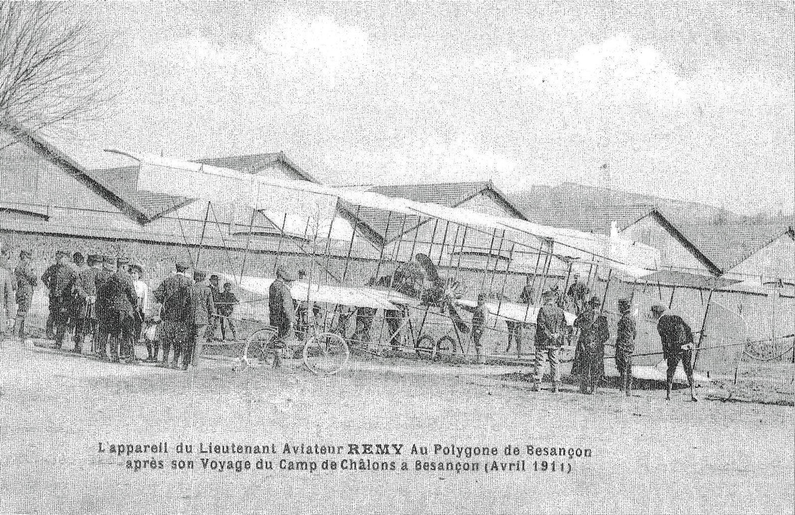 Vol de Mourmelon à Besançon en avril 1911 par l'aviateur Remy. Arrivée à Besançon.